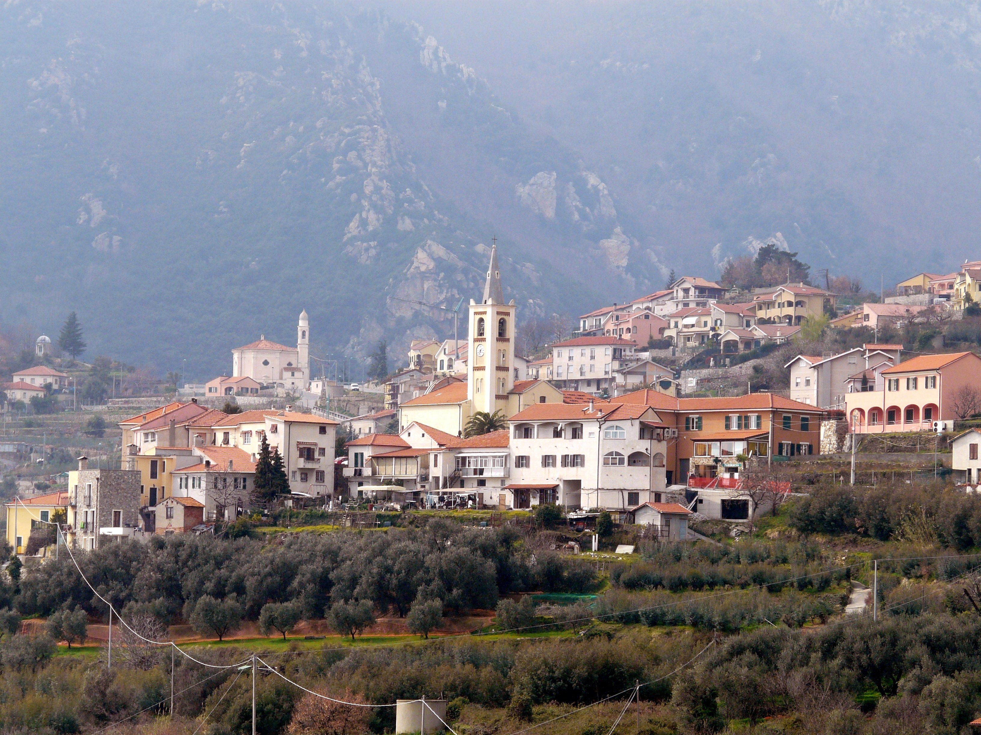 Magliolo, Liguria, Italia